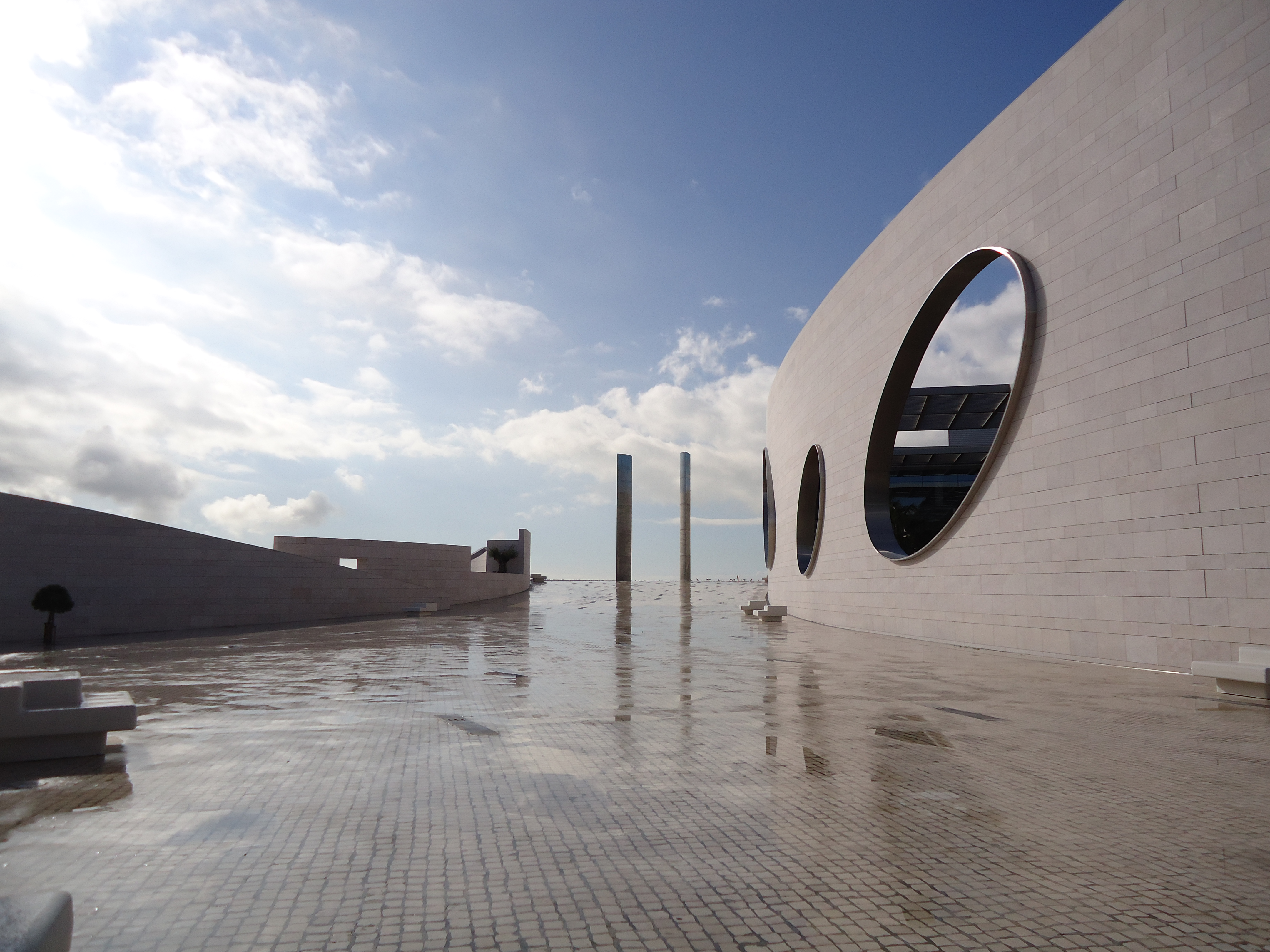 Champalimaud Centre for the Unknown, Lisboa, Portugal: vista externa.